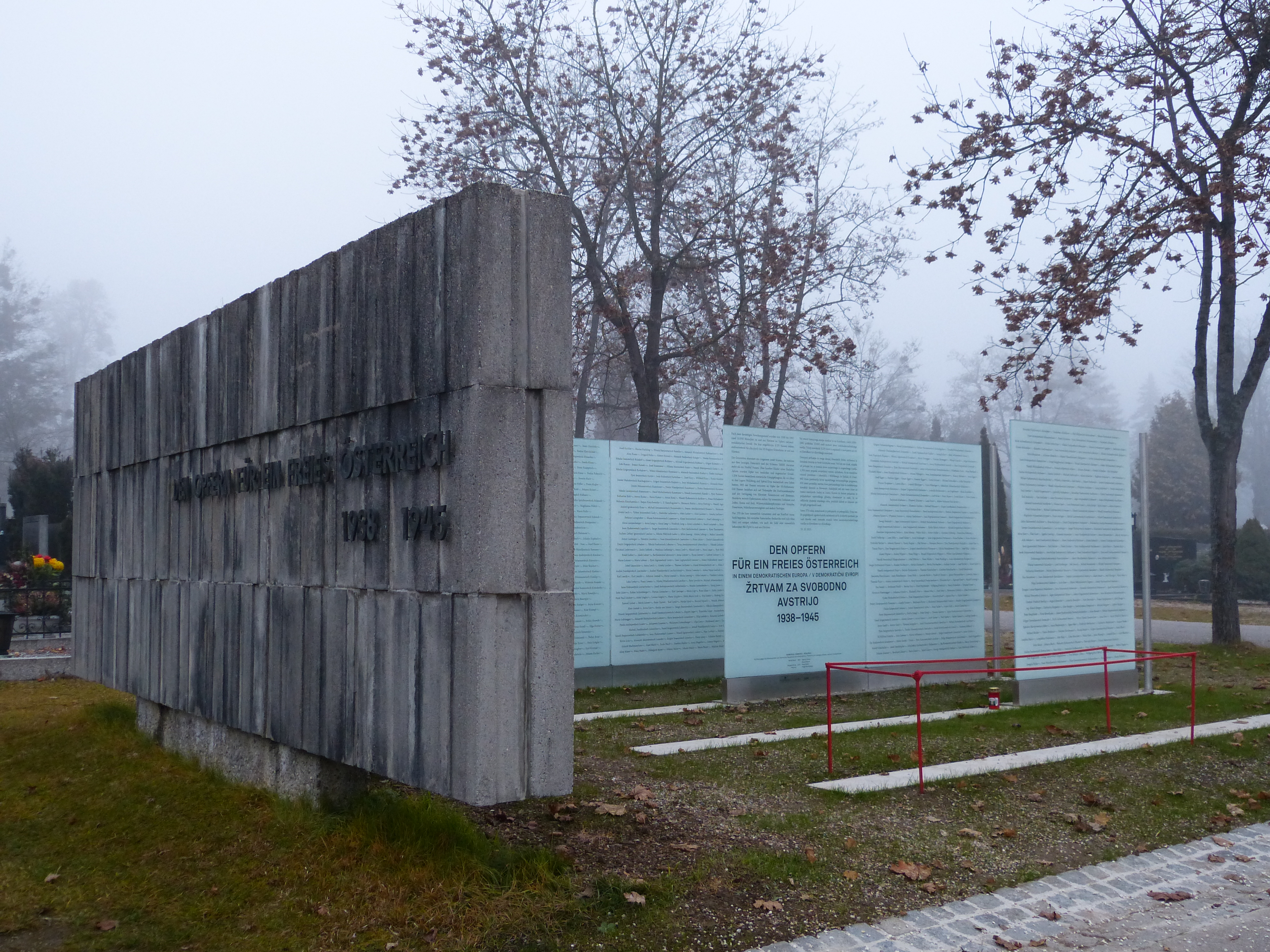 Gedenkstätte: Den Opfern für ein freies Österreich 1938-1945, am Friedhof Annabichl, Klagenfurt. links: Relief (Rudolf Nitsch und Valentin Oman), 1967. rechts: Namenstafeln (Klaus Holler, Helge Stromberger), 2015.